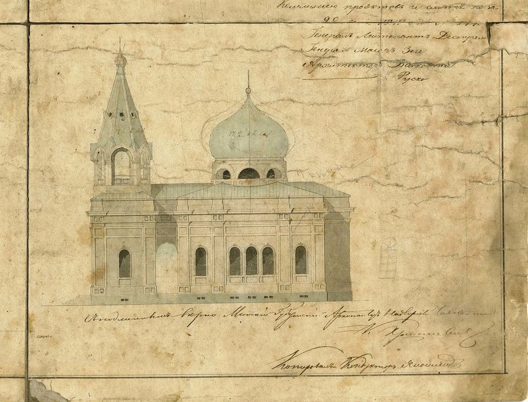 Беларуская (тарашкевіца): Менск (Miensk), Старажоўка (Staražoŭka). Царква Сьвятой Марыі Магдаліны, рэалізаваны праект